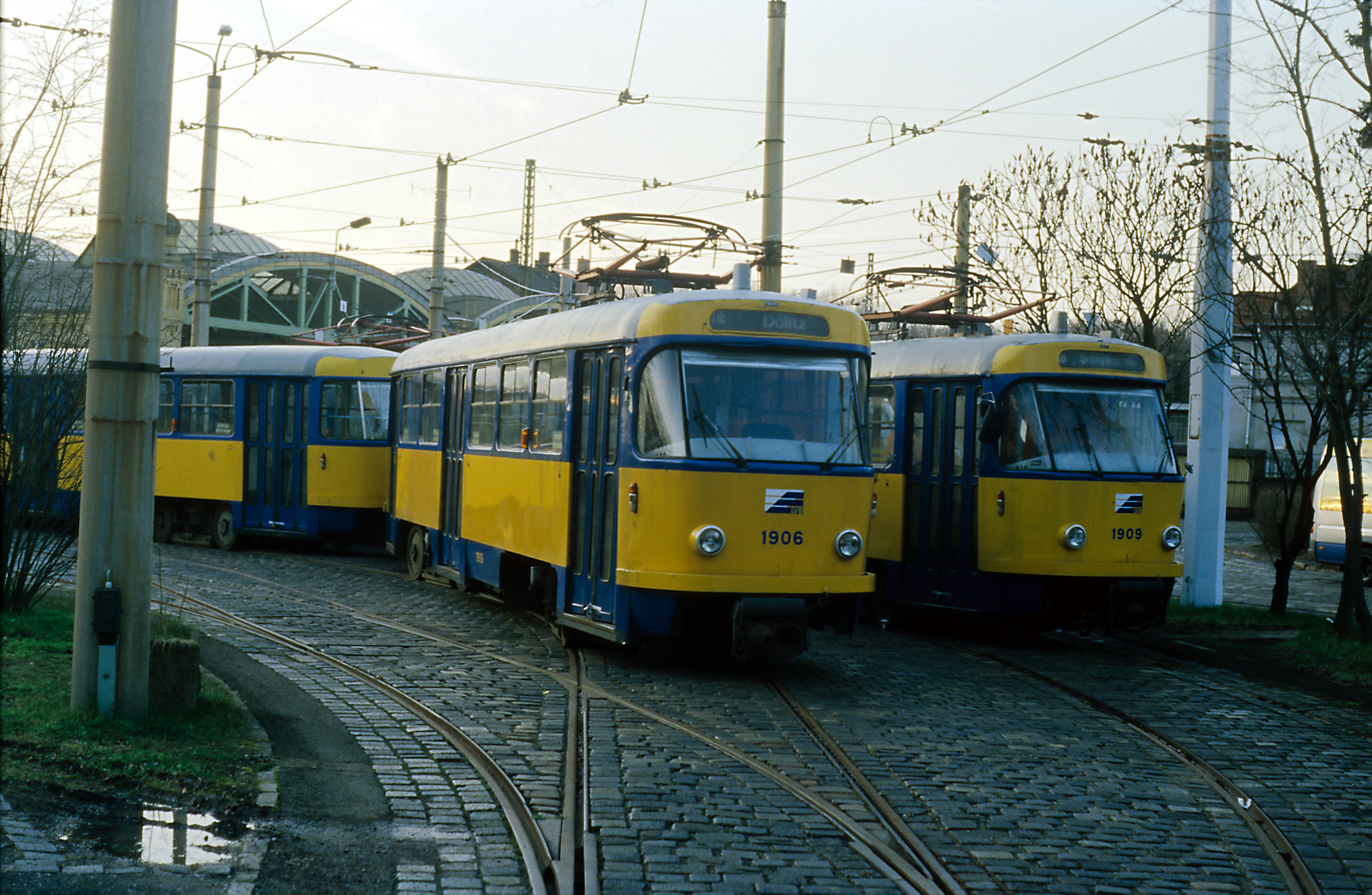 Freiabstellgruppe neben den Hallen, 1981 gebaut. Die nichtmodernisierten Wagen der Typen 33, 33a, 65 und 65a wurden vor der Fußballweltmeisterschaft 2006 für den höheren Bedarf teilweise reaktiviert und im neuen Anstrichschema lackiert. Nach dem Ende dieser WM wurden sie von den LVB endgültig ausgemustert und in Leutzsch abgestellt. Die Mehrzahl der Wagen wurde später zerlegt.